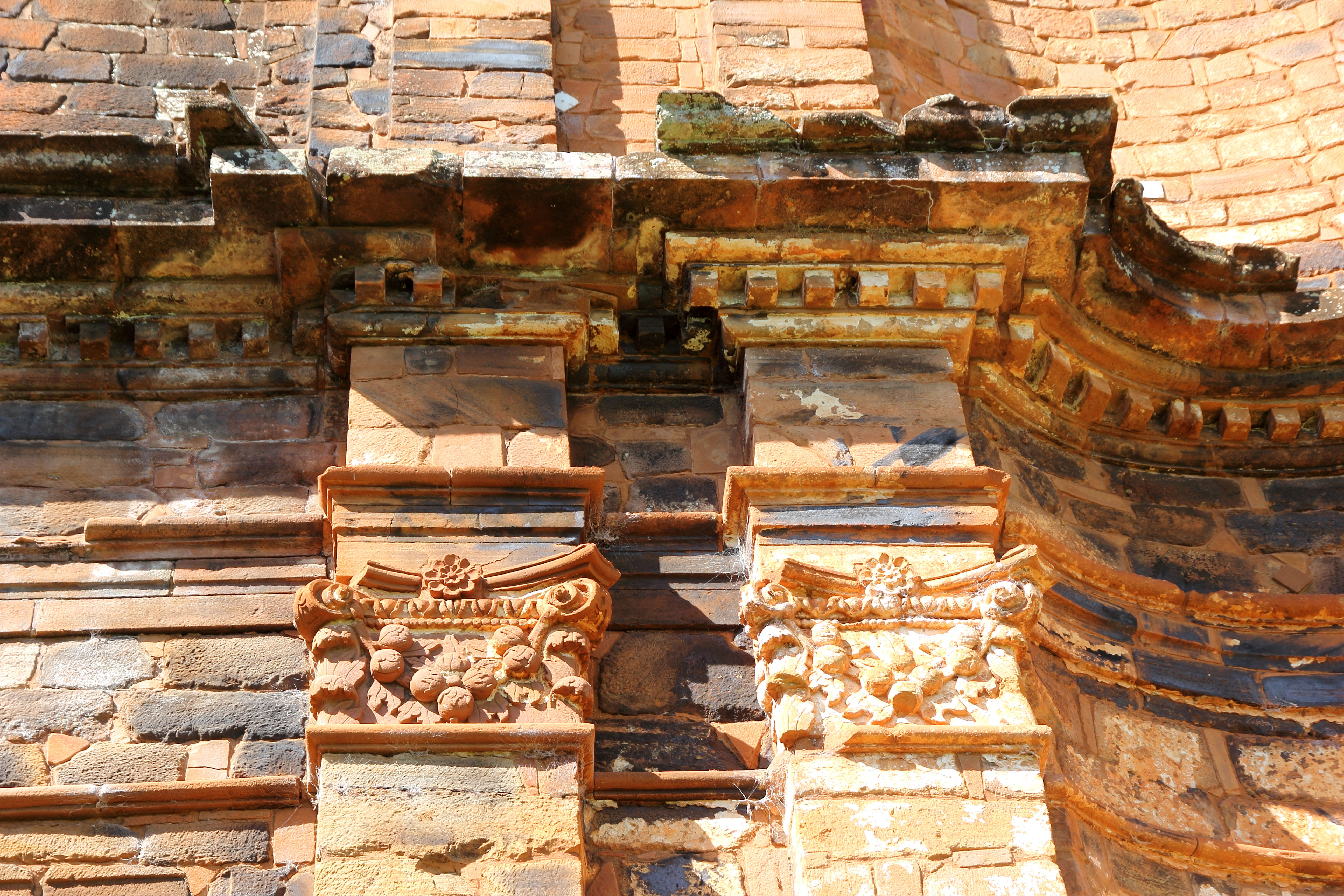 Sítio Arqueológico de São Miguel Arcanjo em São Miguel das Missões, RS.